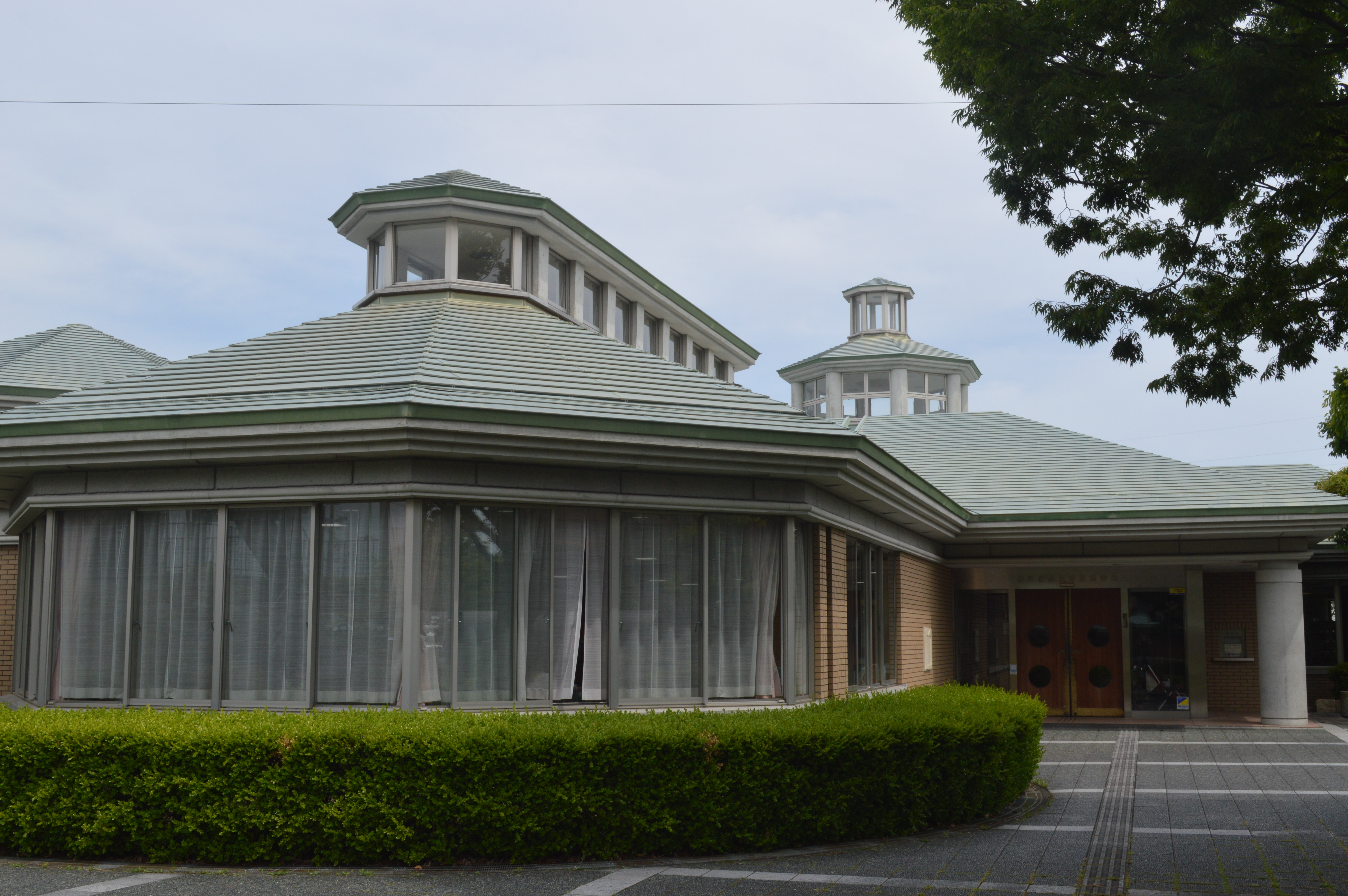 静岡県焼津市にある焼津市立大井川図書館。旧・大井川町立図書館。